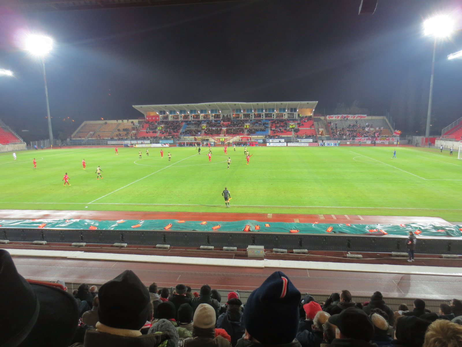 Dijon FCO